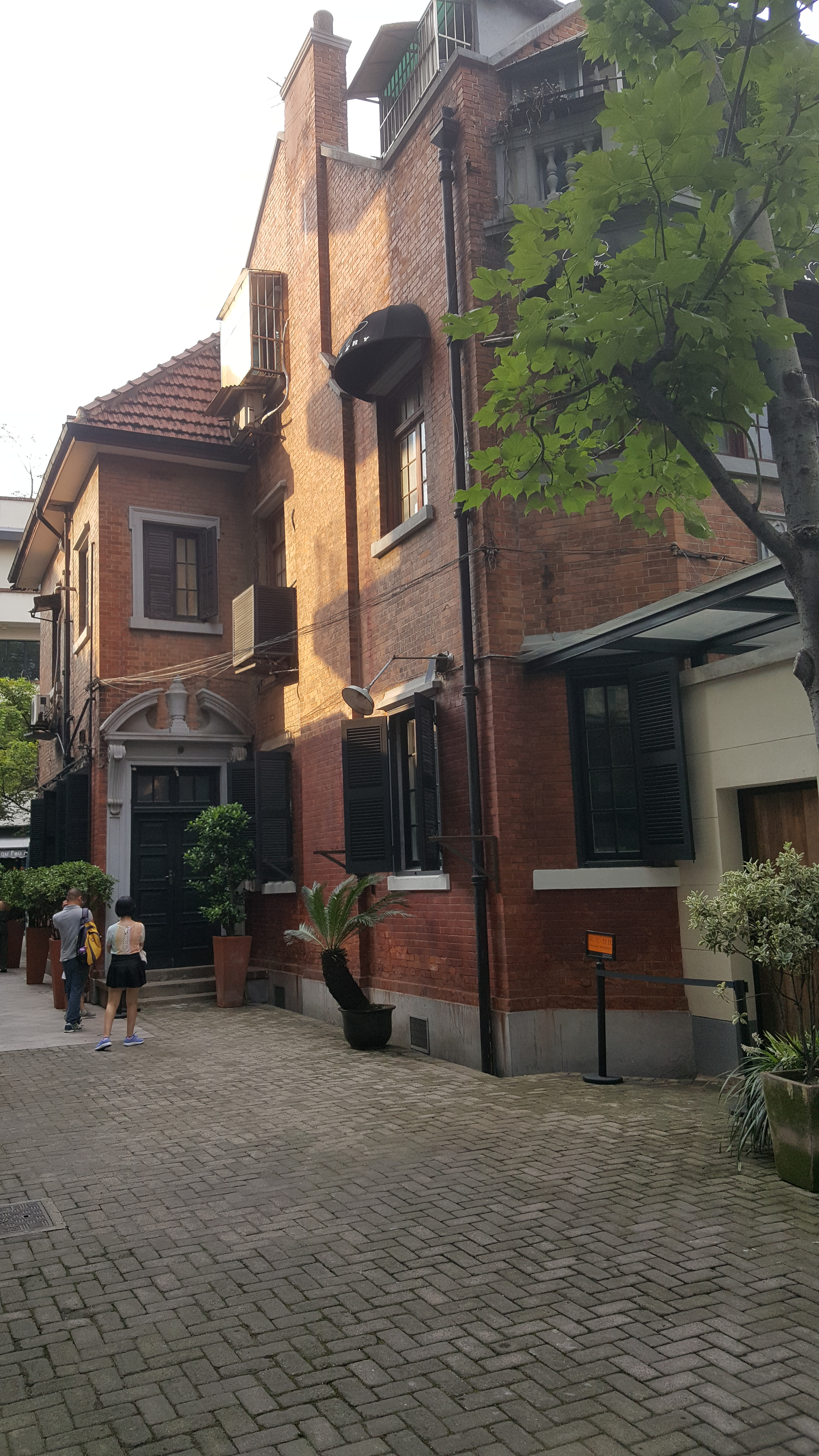 中文（中国大陆）: 武康路376号住宅是上海市第五批优秀历史建筑